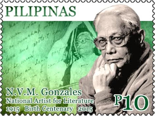 N. V. M. Gonzalez